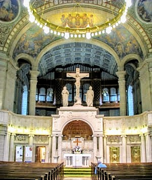 Christuskirche in Mannheim.